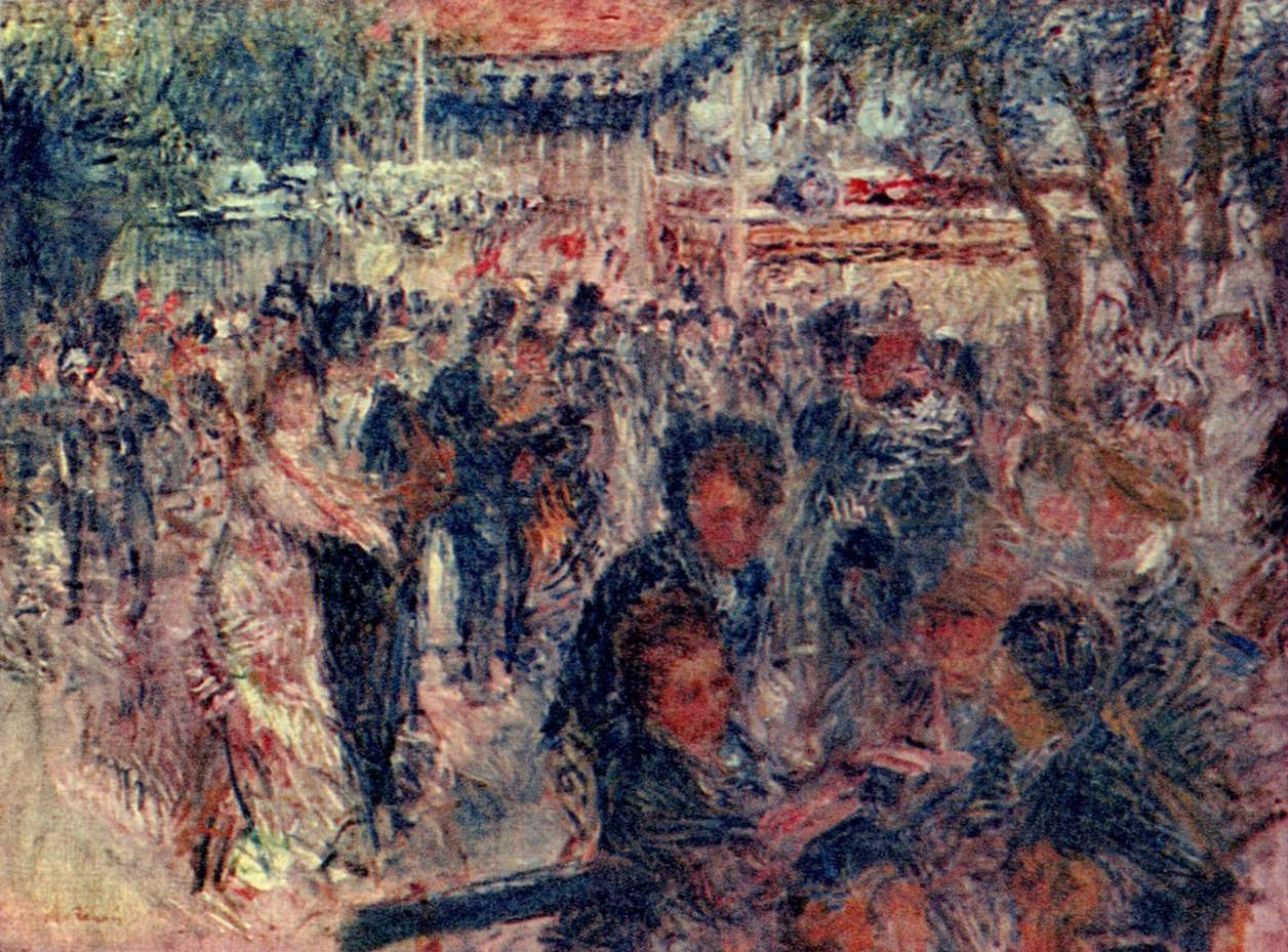 design sketch